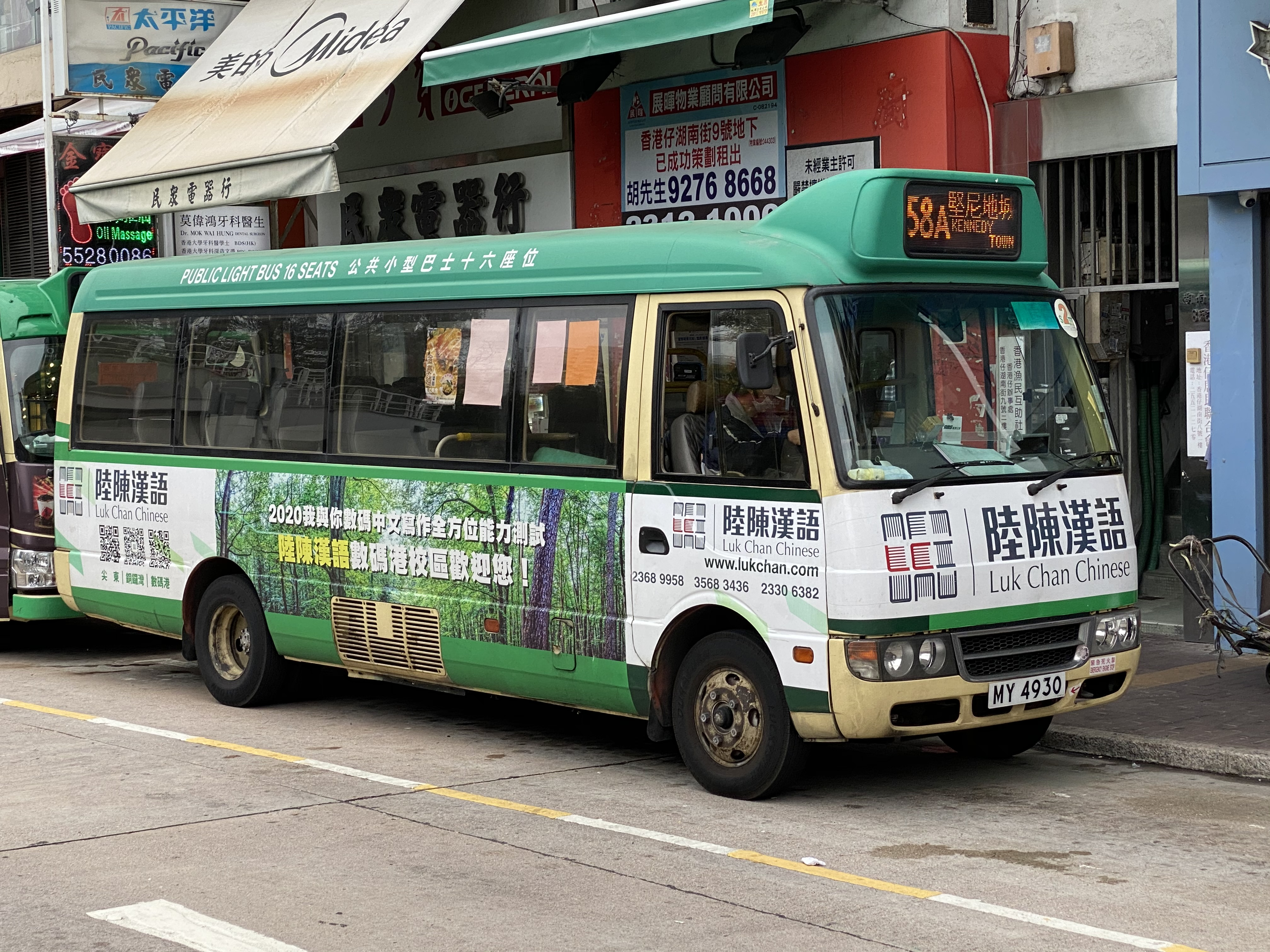 中文（香港）: This photo is taken in Aberdeen.